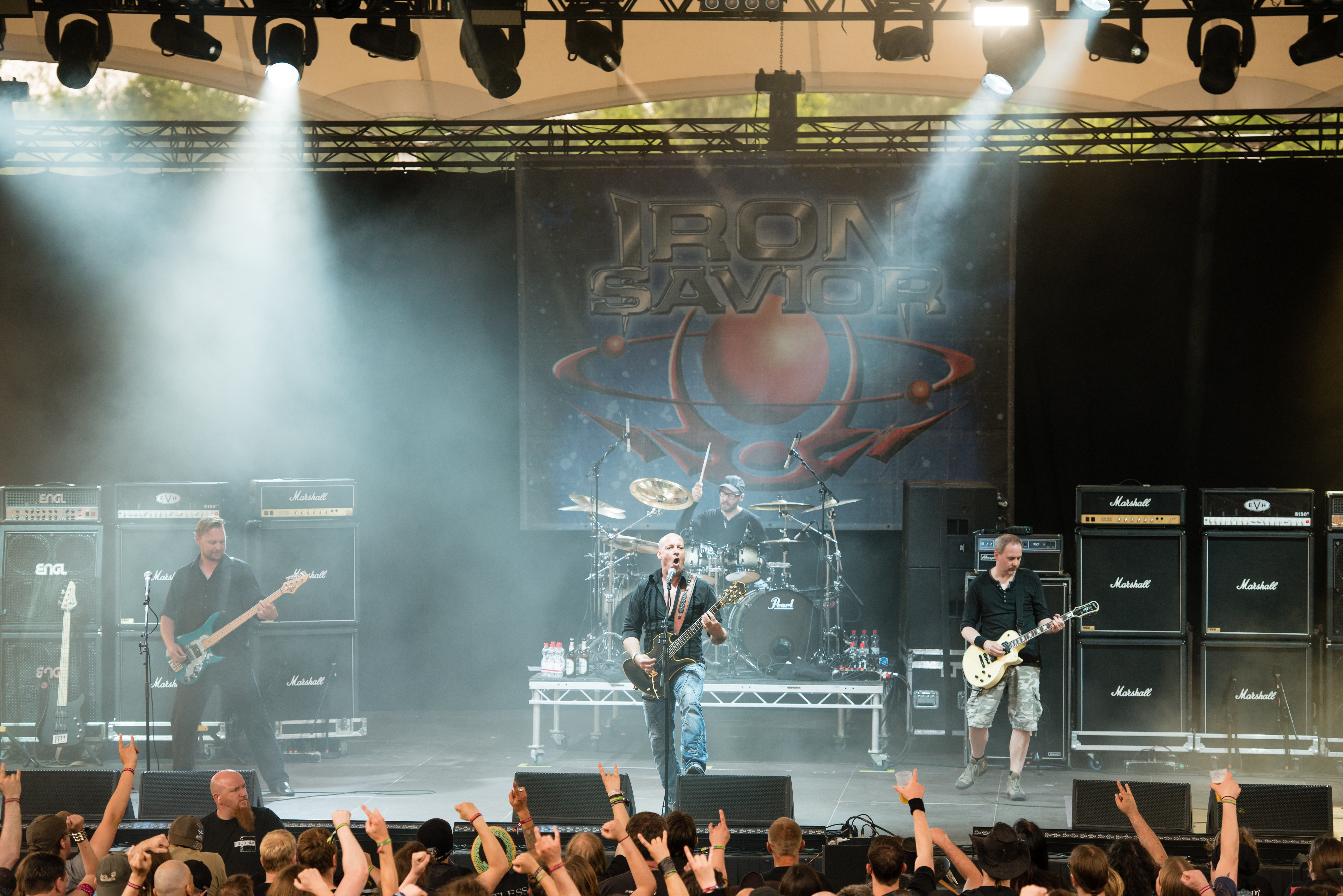 'Rock Hard Festival 2014 - Gelsenkirchen': 'Iron Savior'